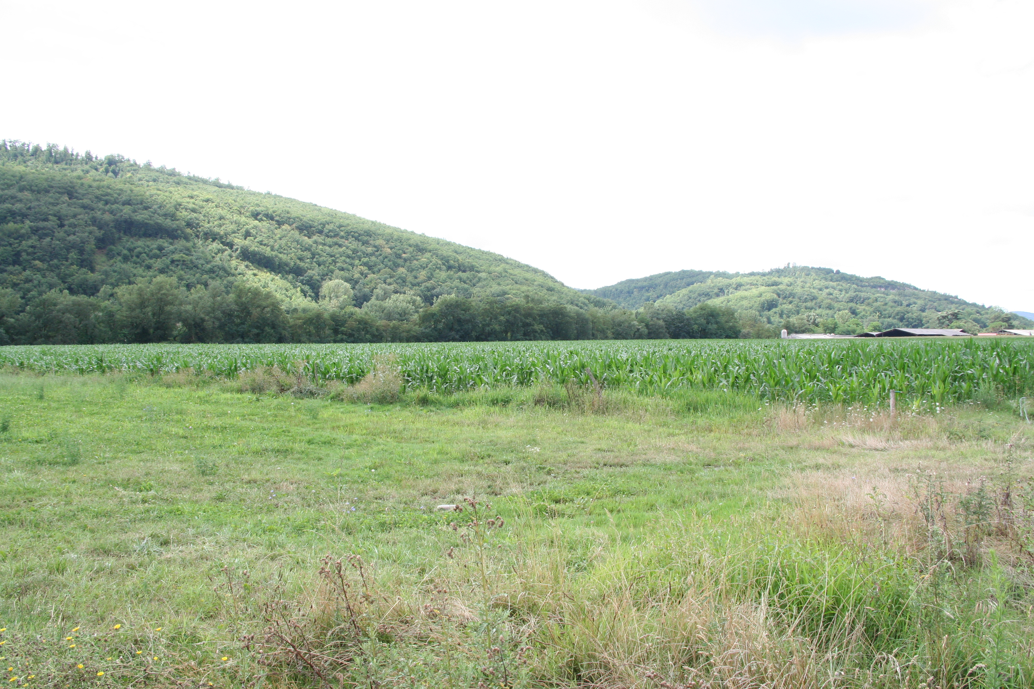 Martres-Tolosane (Haute-Garonne, France) - La campagne à Chiragan.